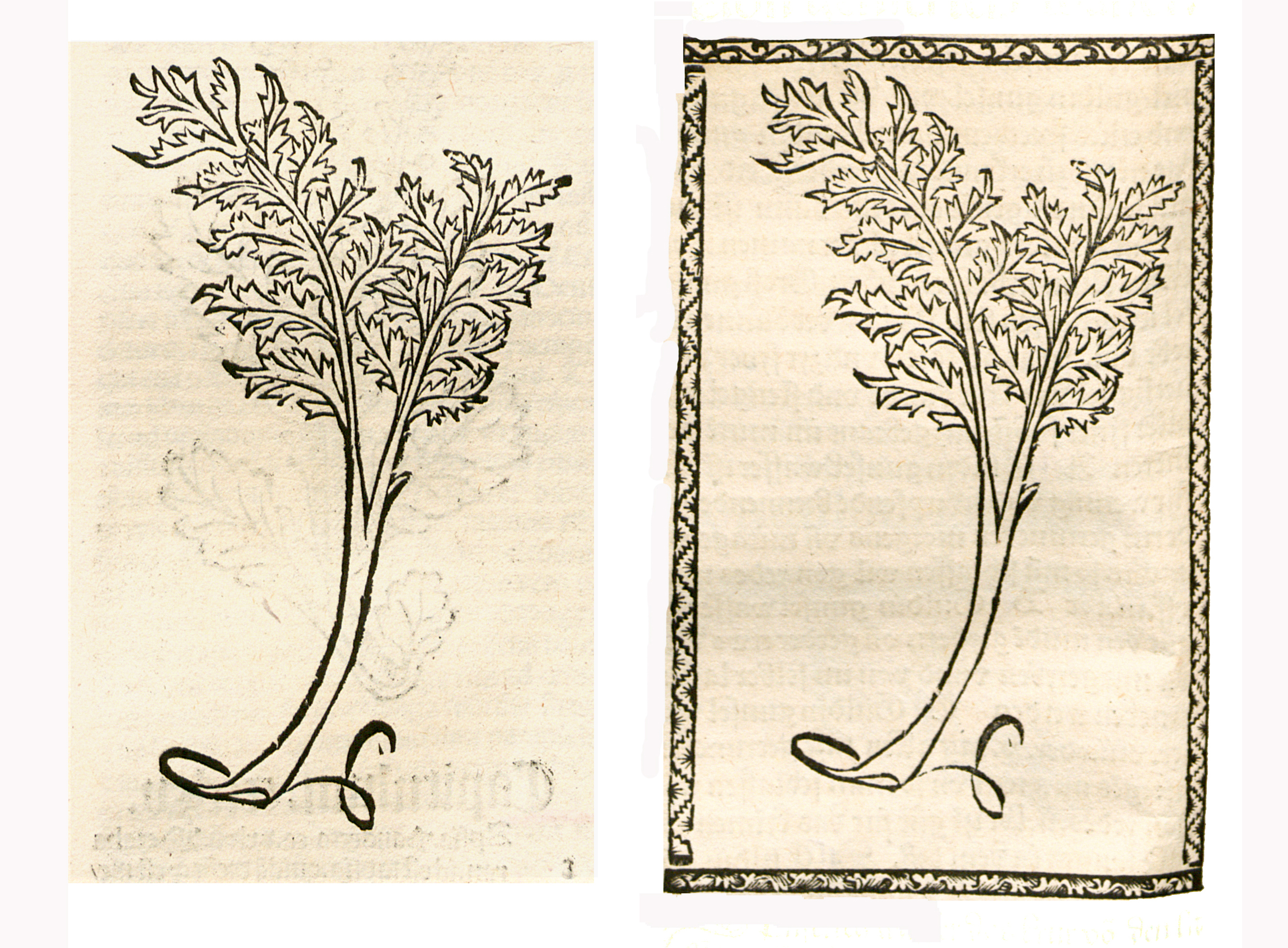 Abbildung von: Genserich (Potentilla anserina)